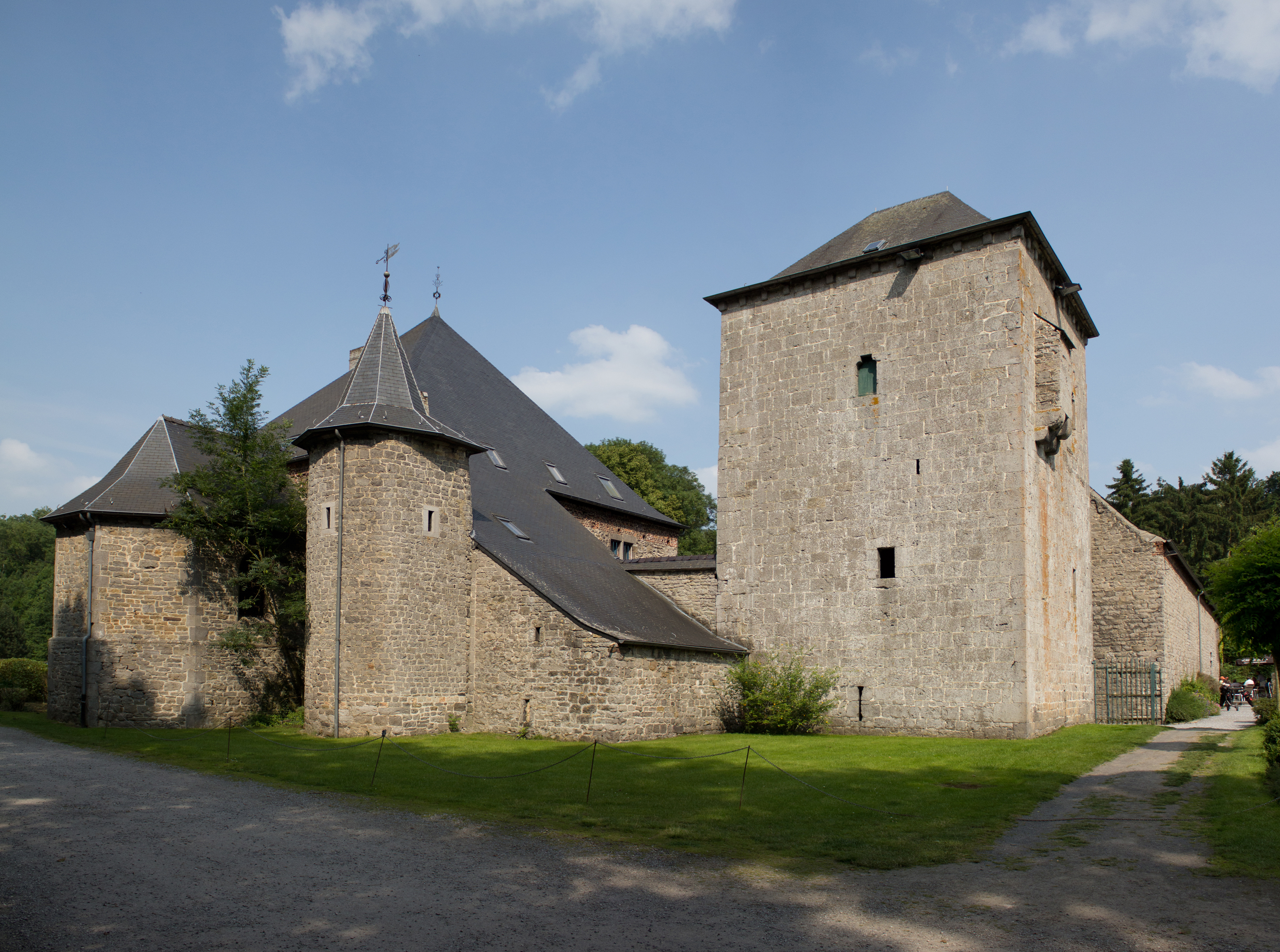 Le château-ferme de Falnuée, Onoz